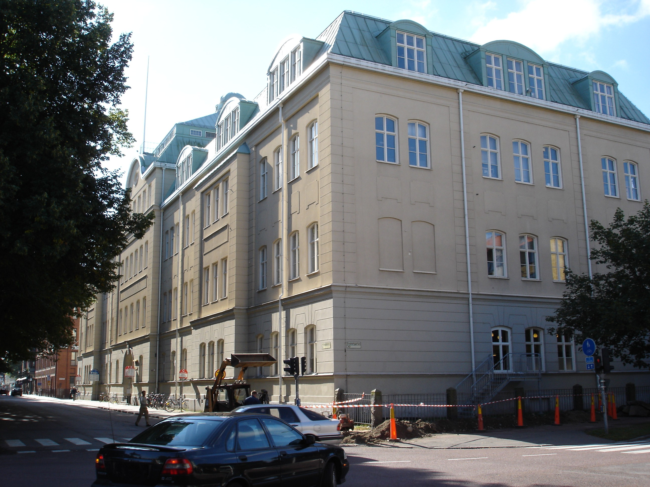 Vasaskolan, Gavle, Sweden